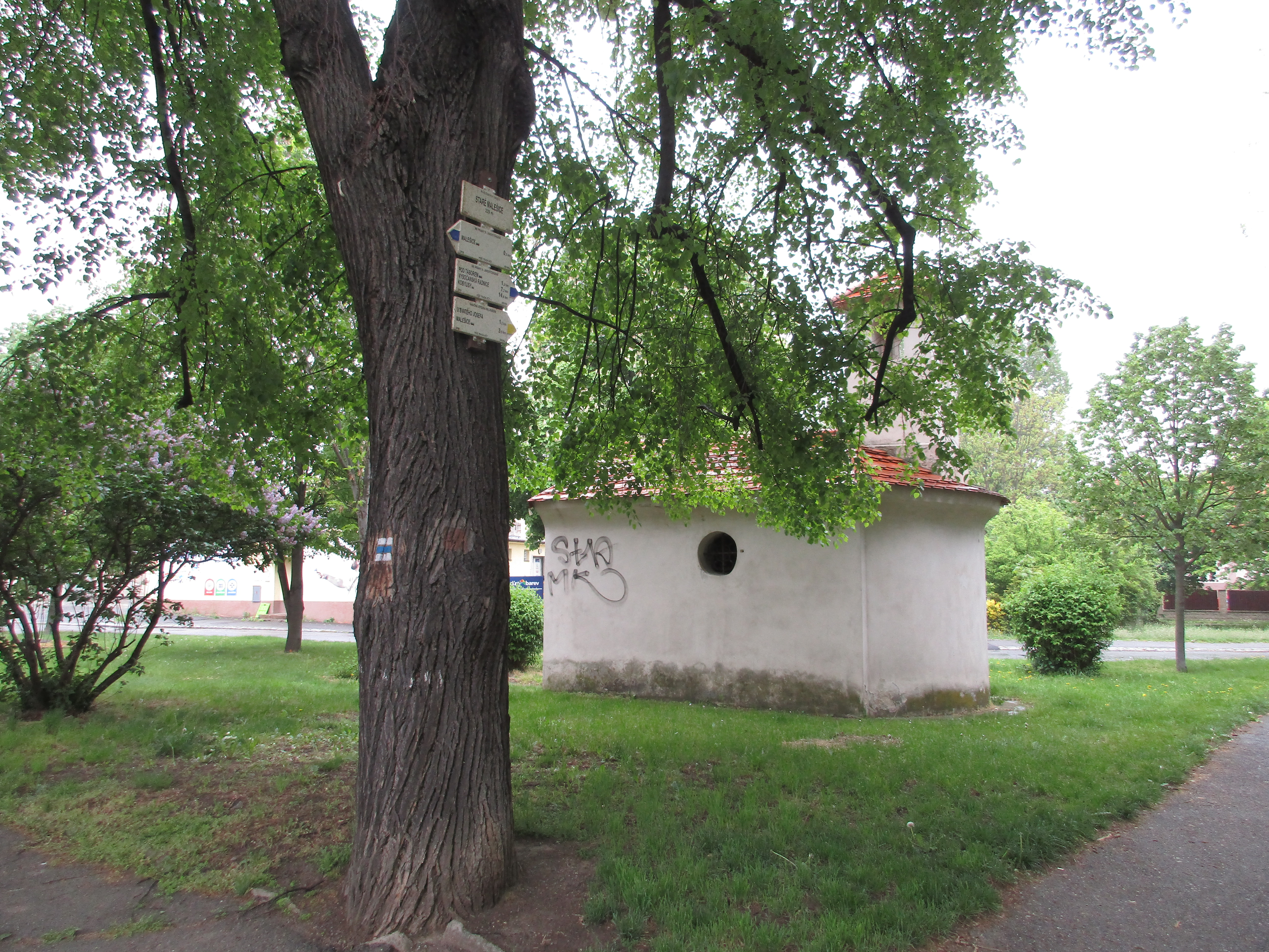 Turistická značená trasa Kobylisy-Malešice.